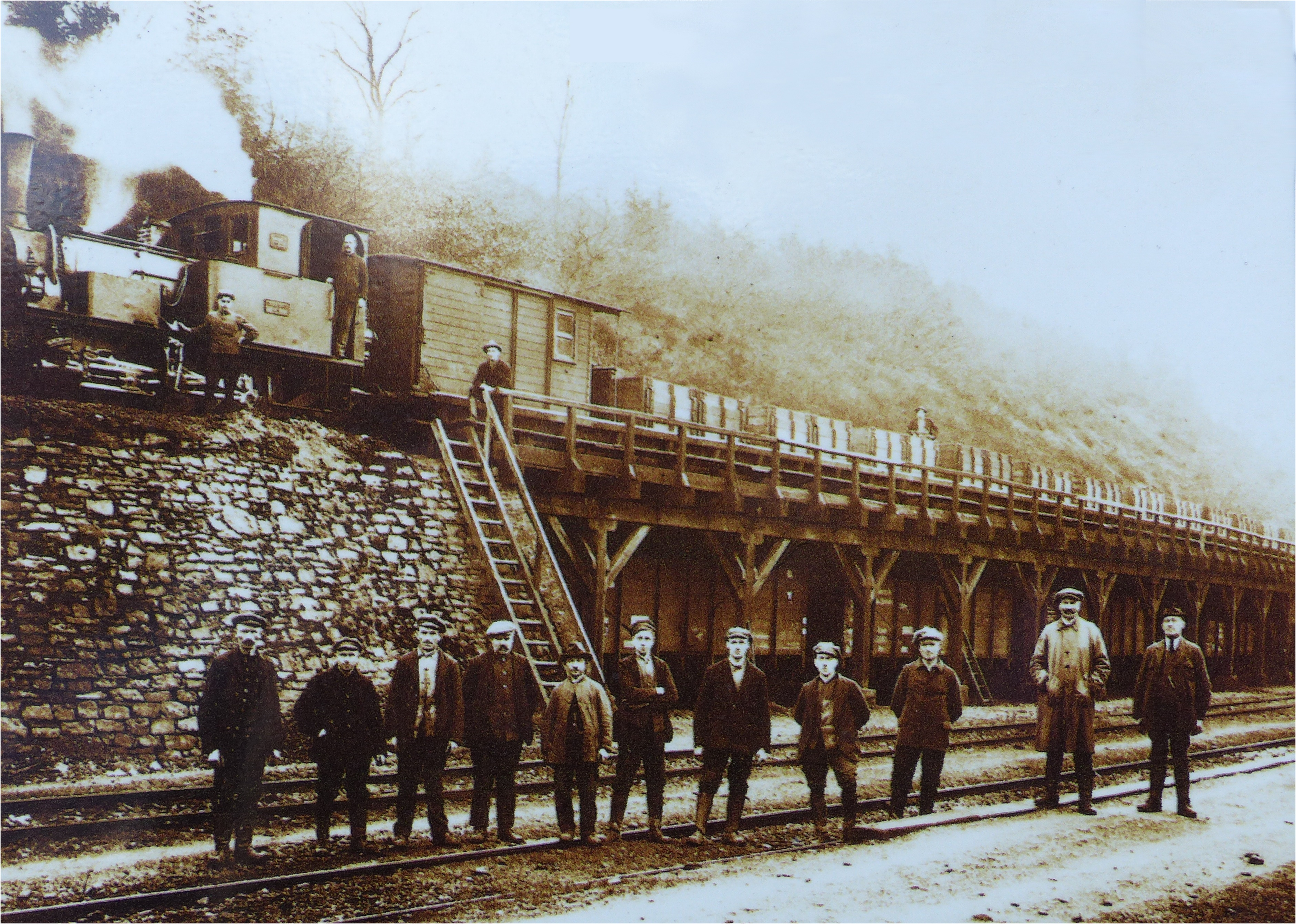 Verladung von Erz aus der Grube Louise am Bahnhof Seifen. Oben ein Zug der Kruppschen Bahn.